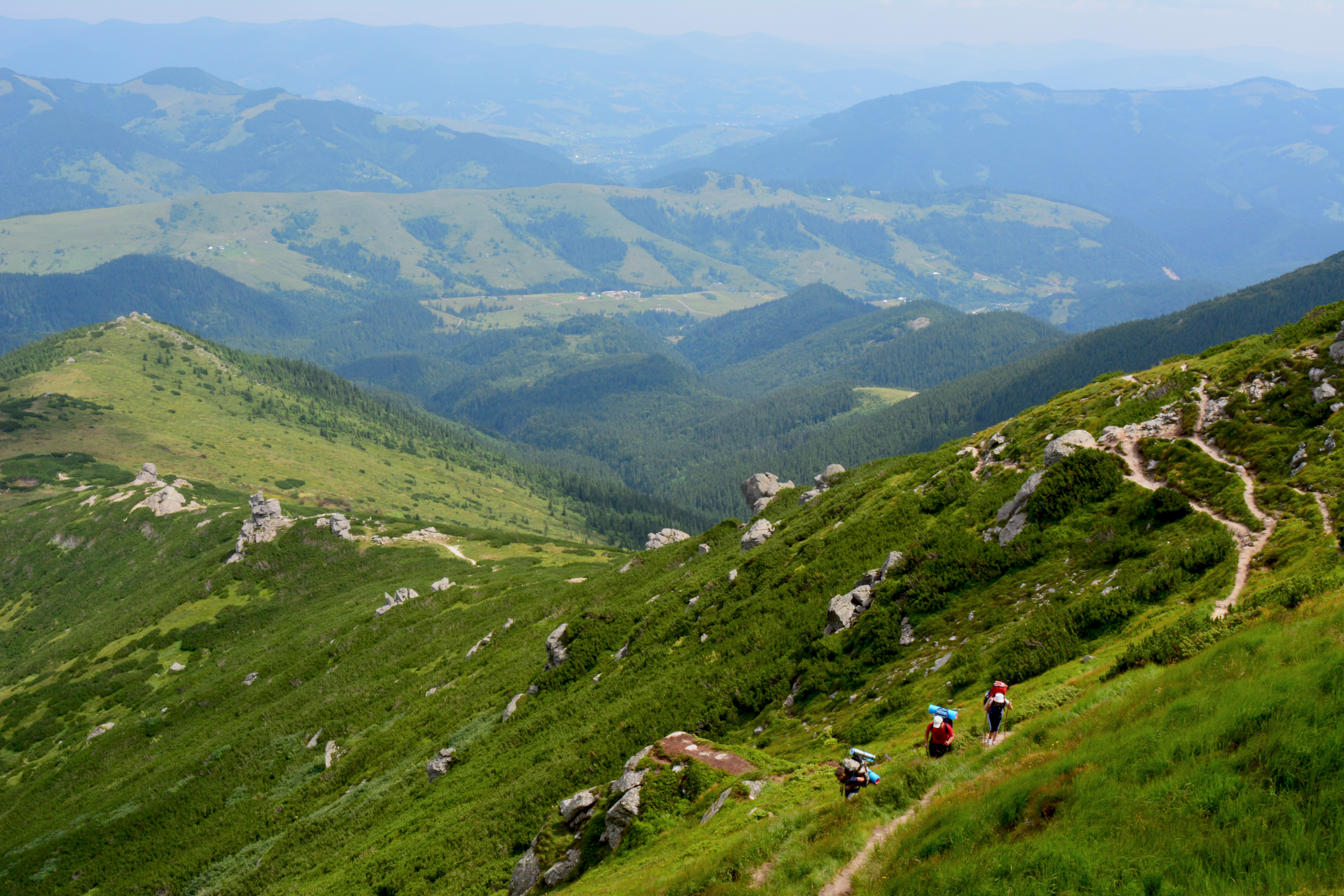 «Верховинський», Верховинський район